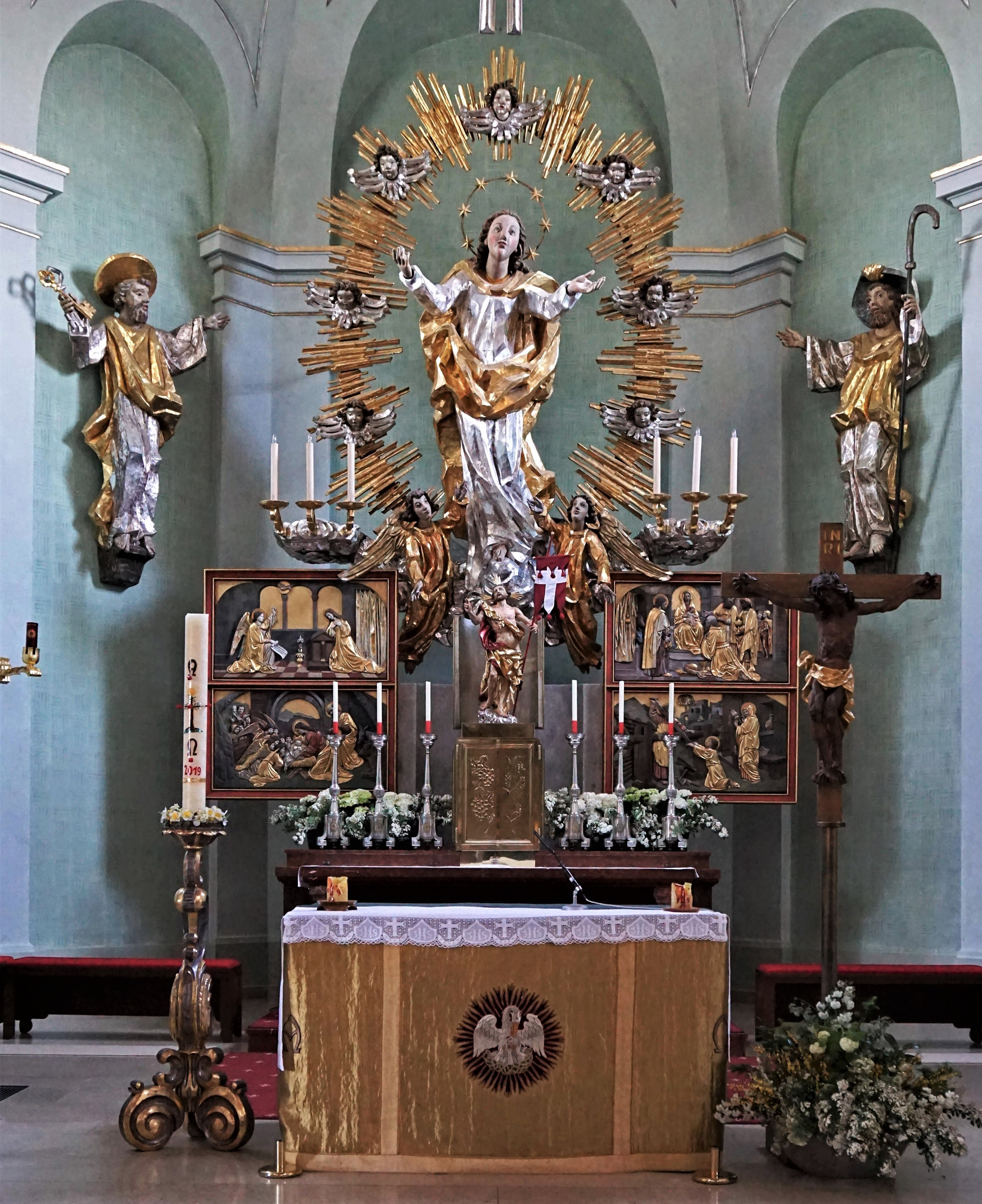 Kath. Pfarrkirche Hl. Jakobus d. Ä. (BDA-ID: 7975), Obertrum am See, Hochaltar